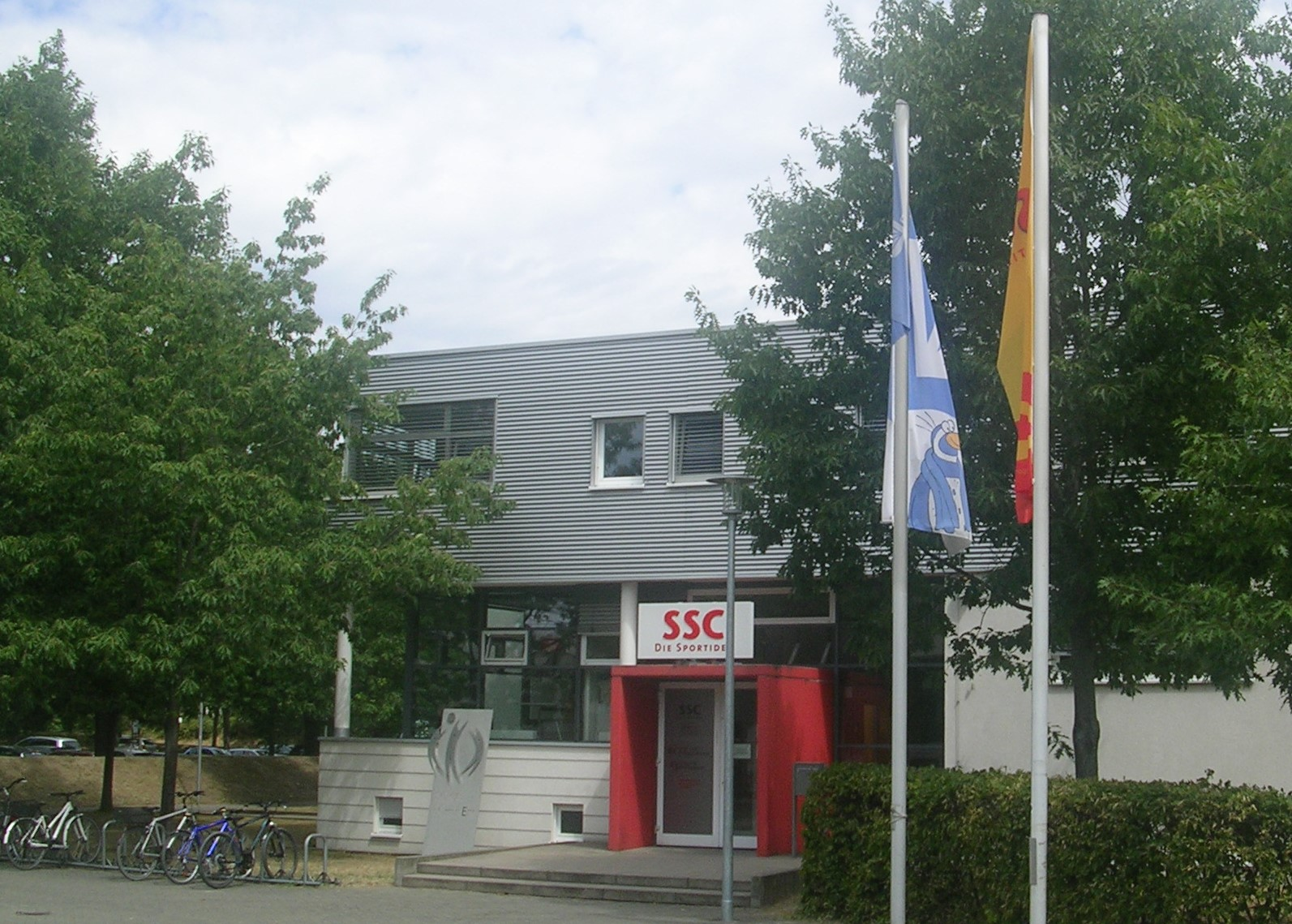 SSC Sport21 Eingangsbereich Südosten